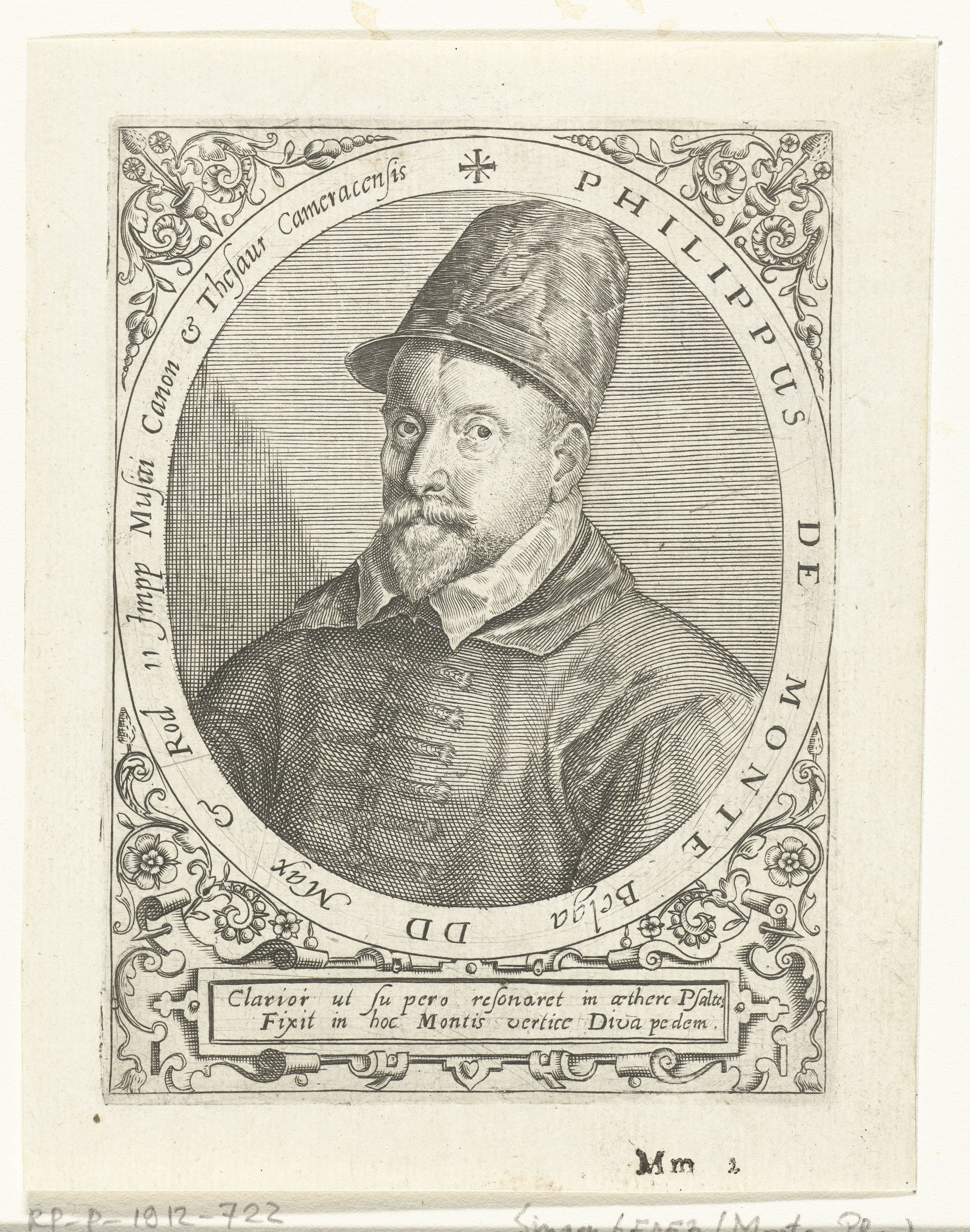 IdentificatieTitel(s): Portret van Philippe de MontePhilippus de Monte (titel op object)Objecttype: prent boekillustratie Objectnummer: RP-P-1912-722Catalogusreferentie: Singer 65053Opschriften / Merken: verzamelaarsmerk, verso, gestempeld: Lugt 2228Omschrijving: Portret van de componist Philippe de Monte, in ovaal met randschrift. Onder het portret een lofdicht.VervaardigingVervaardiger: prentmaker: Theodor de Bryprentmaker: Johann Theodor de Brynaar ontwerp van: Jean Jacques Boissard (mogelijk)Plaats vervaardiging: Frankfurt am MainDatering: ca. 1597 - ca. 1599Fysieke kenmerken: gravure en tekst in boekdrukMateriaal: papier Techniek: graveren (drukprocedé) / boekdrukAfmetingen: plaatrand: h 140 mm × b 100 mmToelichtingGemaakt voor: J.J. Boissard, Icones virorum illustrium doctrina &c eruditione praestanti um contines. Frankfurt am Main: de Bry, 1597-1599.OnderwerpWat: portrait of composerWie: Philippus de MonteVerwerving en rechtenCredit line: Schenking van de heer J.J. de Graaf, HaarlemVerwerving: schenking 1912Copyright: Publiek domein